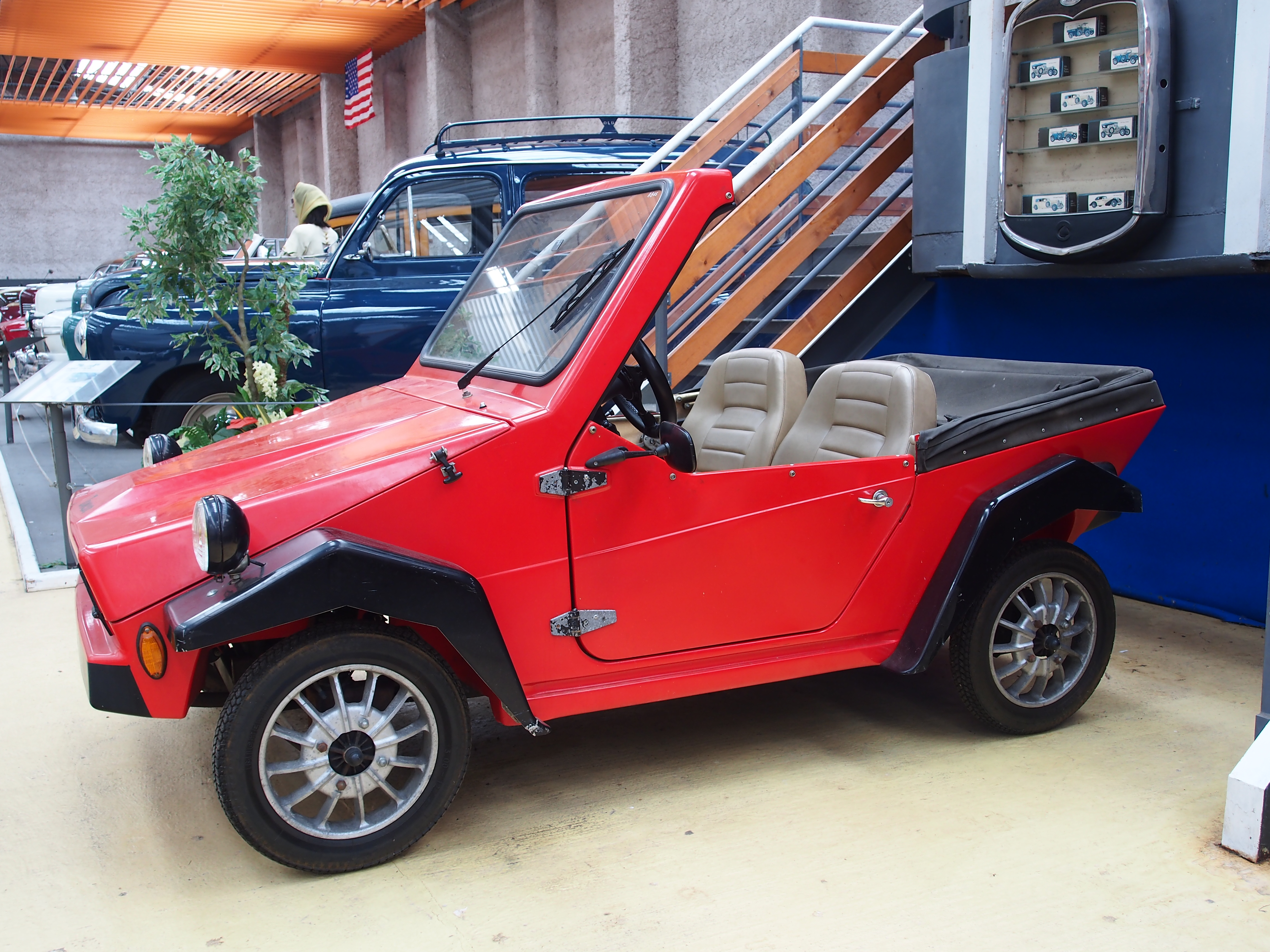 Photographed at the Association Lorraine des Amateurs d'Automobiles de collection et de loisirs.